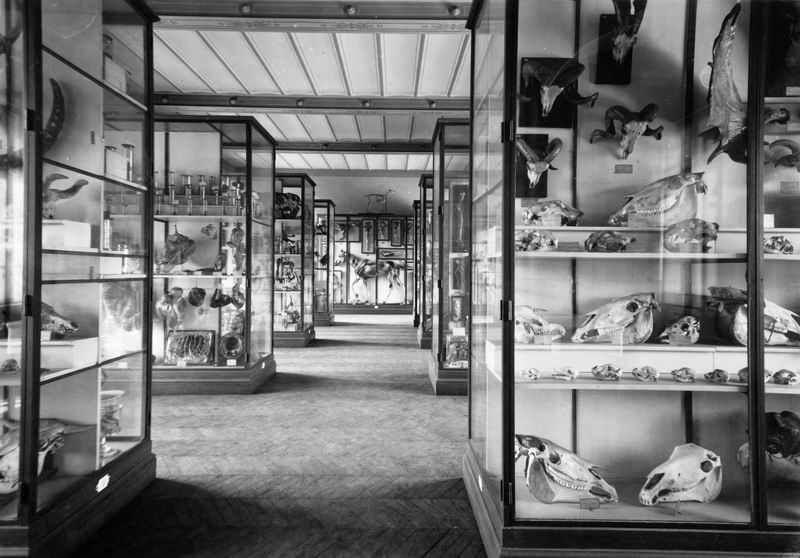 L'entrée du musée de l'Ecole nationale vétérinaire d'Alfort, aux environs de 1920